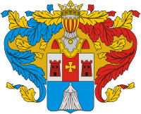 Герб из Общего гербовника дворянских родов Российской империи